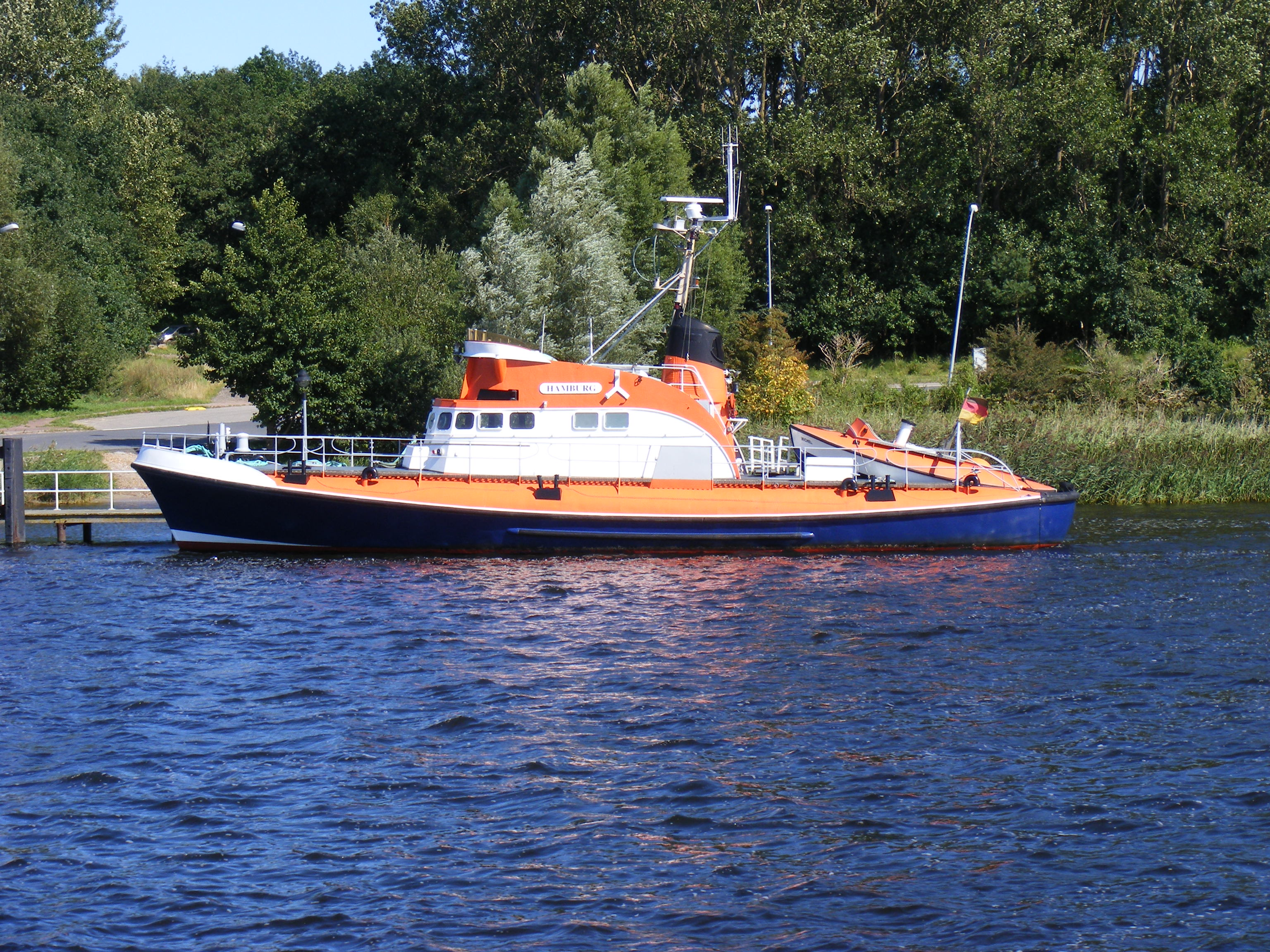 Der frühere Seenotkreuzer "Hamburg" der DGzRS in Rostock-Oldendorf am 22. August 2011